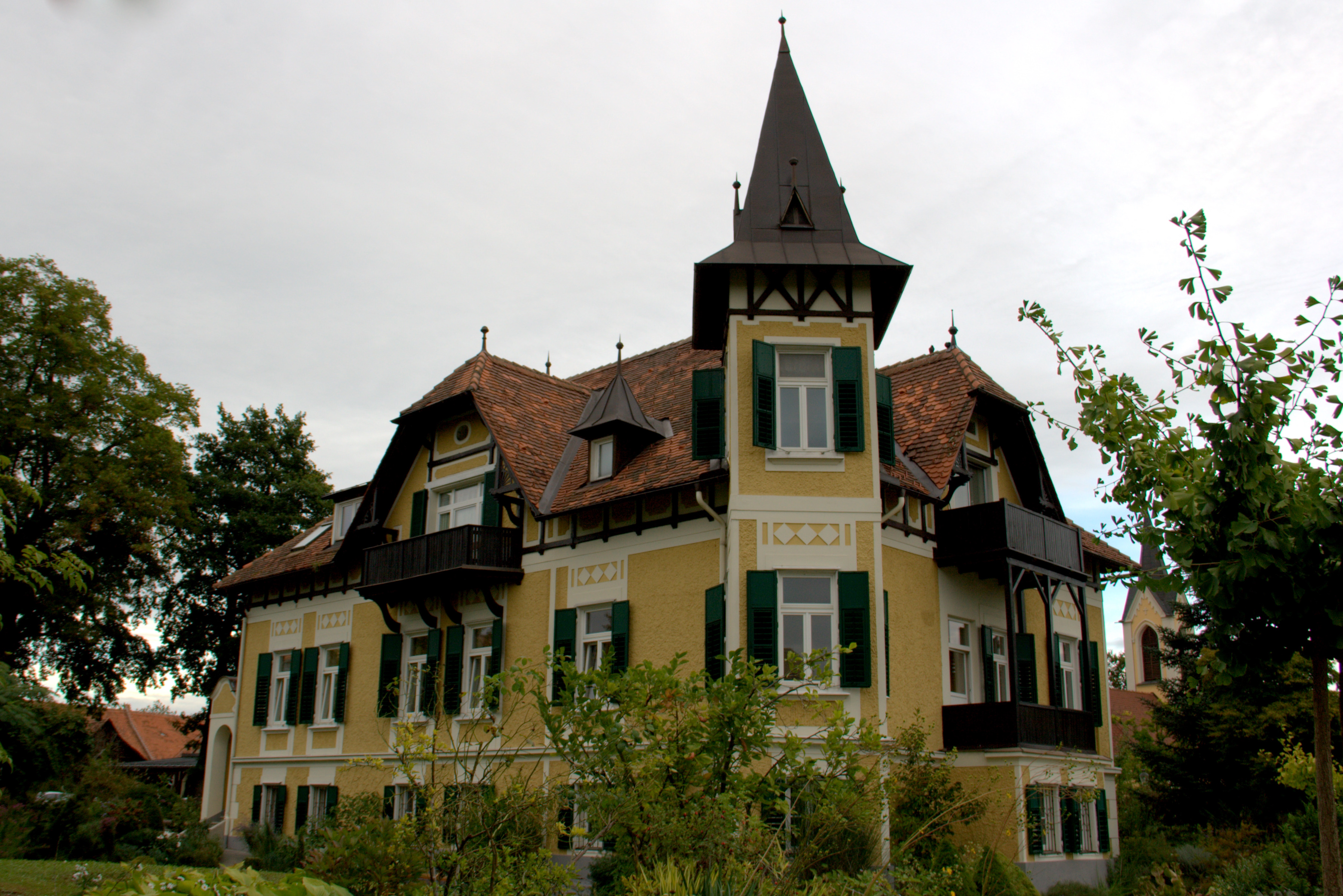 Villa